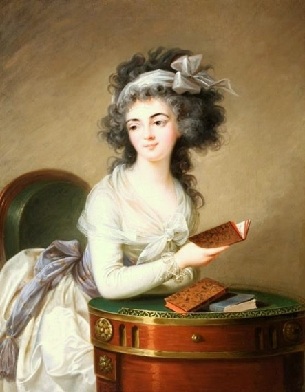 Helena z Massalskich Potocka, 1v. de Ligne